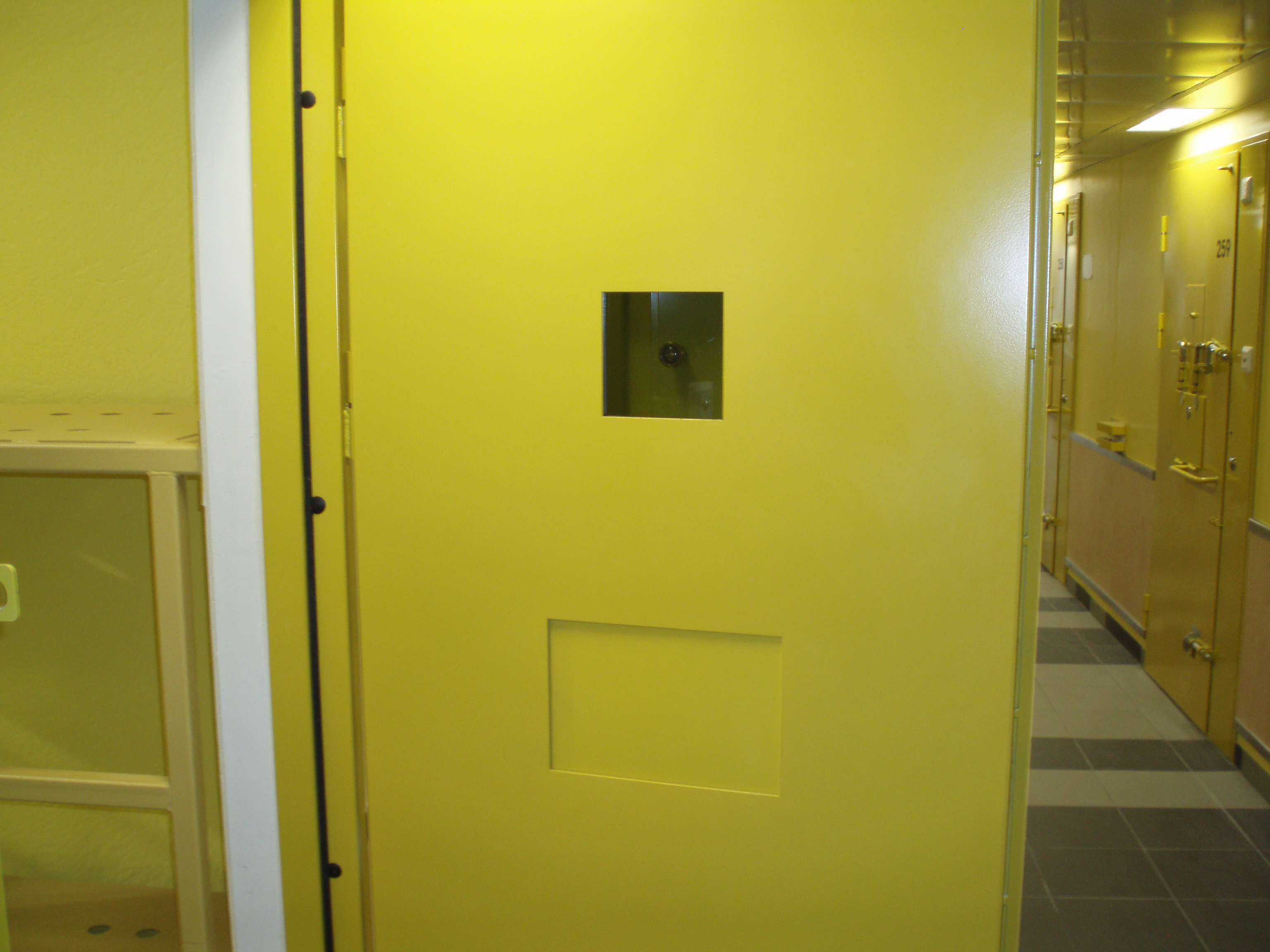 Viru Prison, Estonia